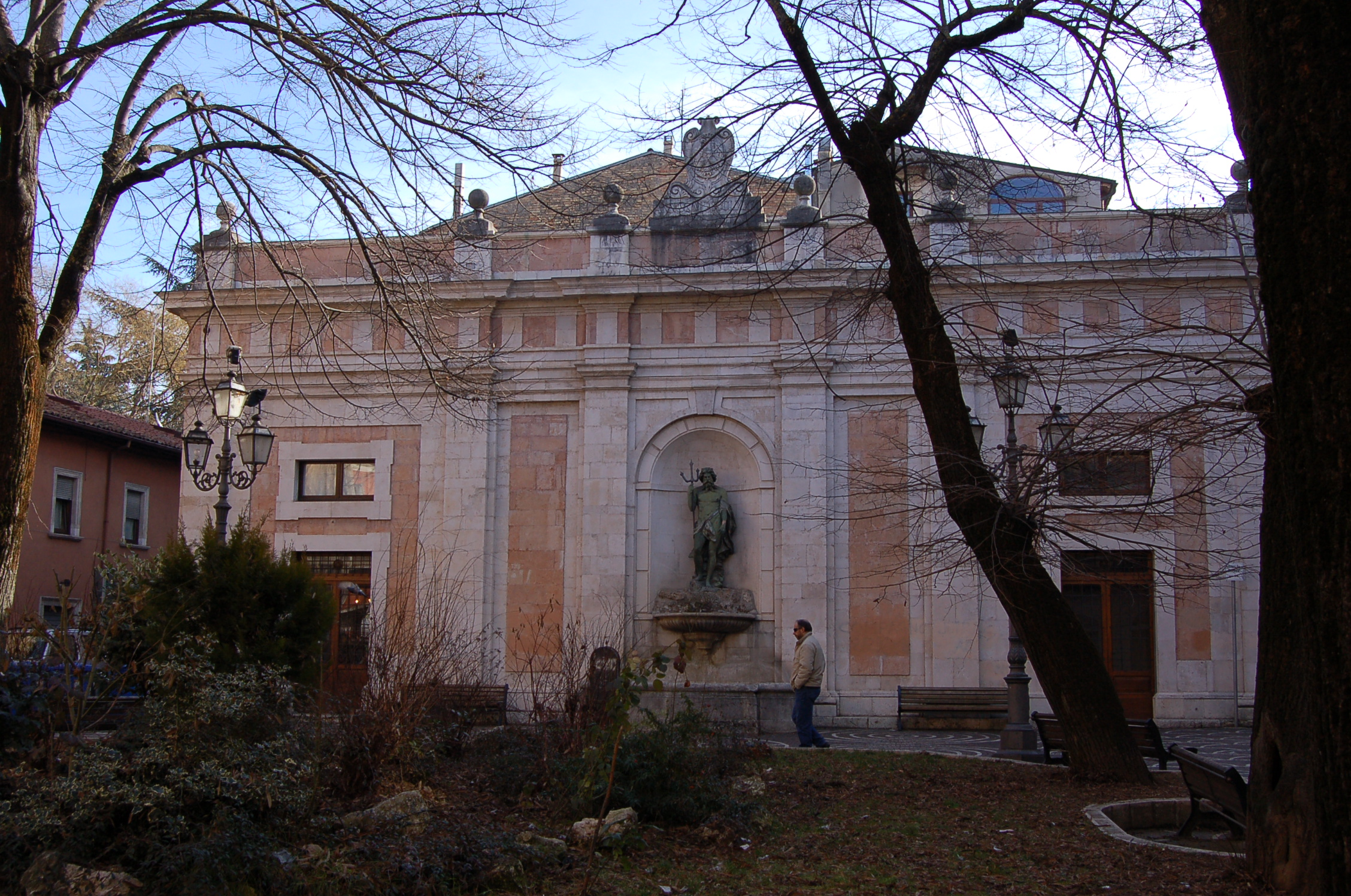 L'Aquila, Italia; Piazza Regina Margherita